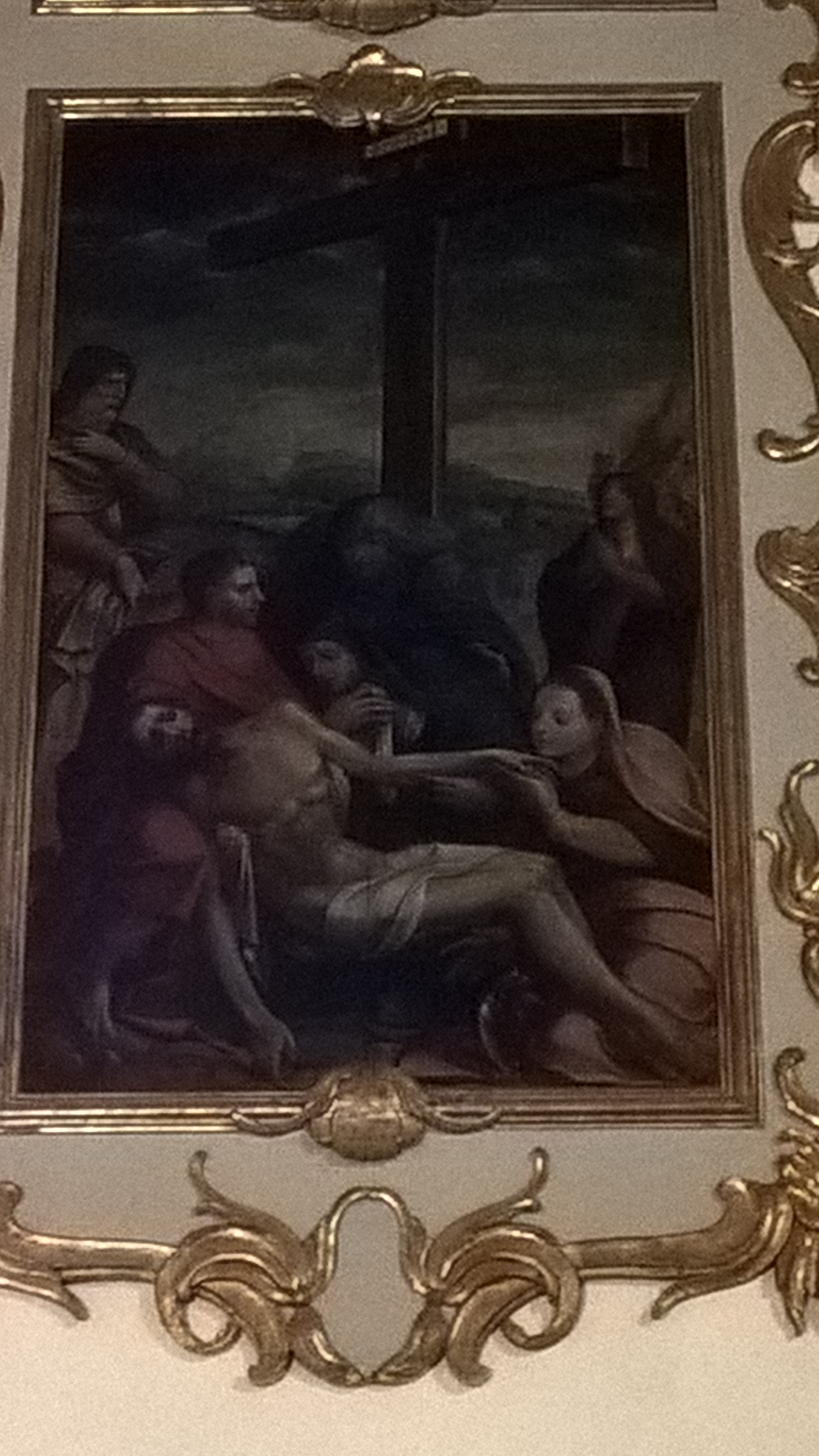 "Lamentação" do Políptico da Igreja Matriz de Santa Cruz